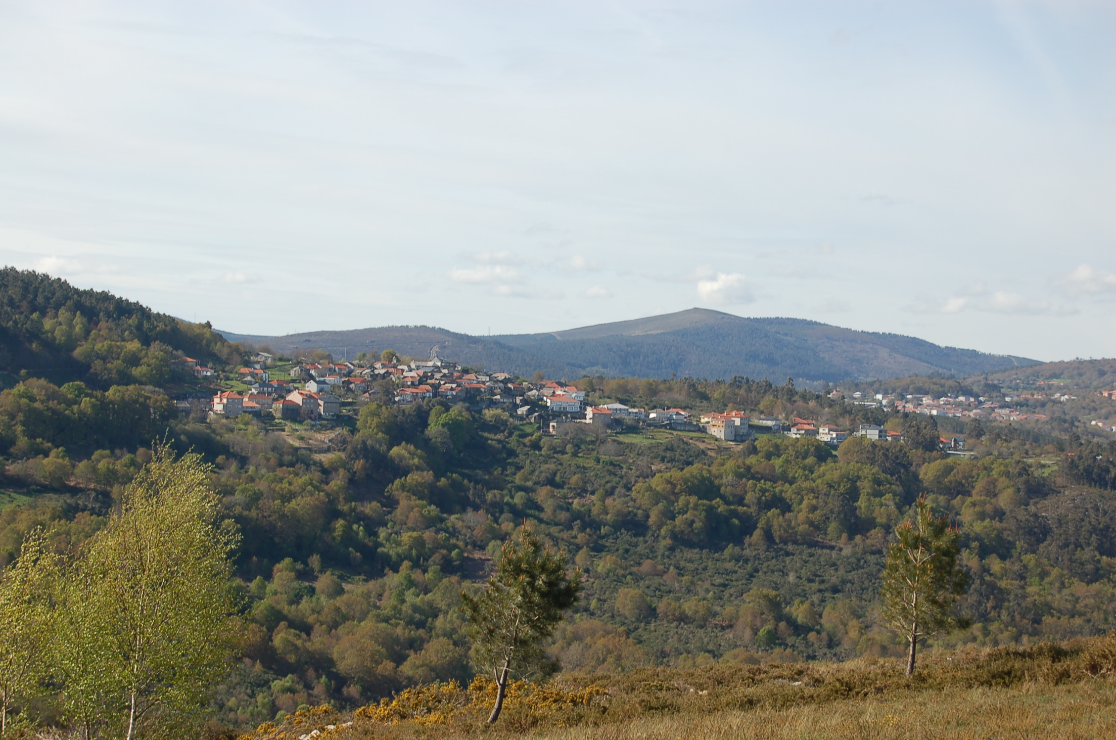 Vista da aldea de Liñares, na parroquia de Baíste, no concello de Avión. Imaxe tomada desde a estrada a Córcores